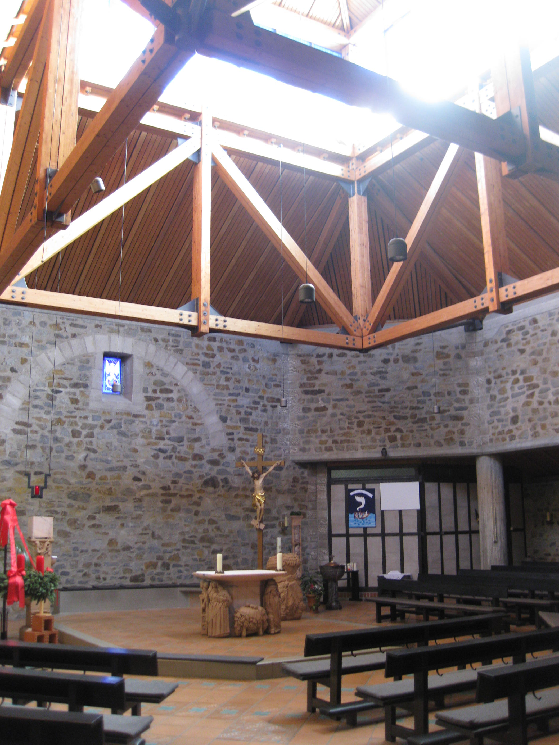 Katholische Kirche im Erzbistum Paderborn, Entwurf 1975, Einweihung 1981